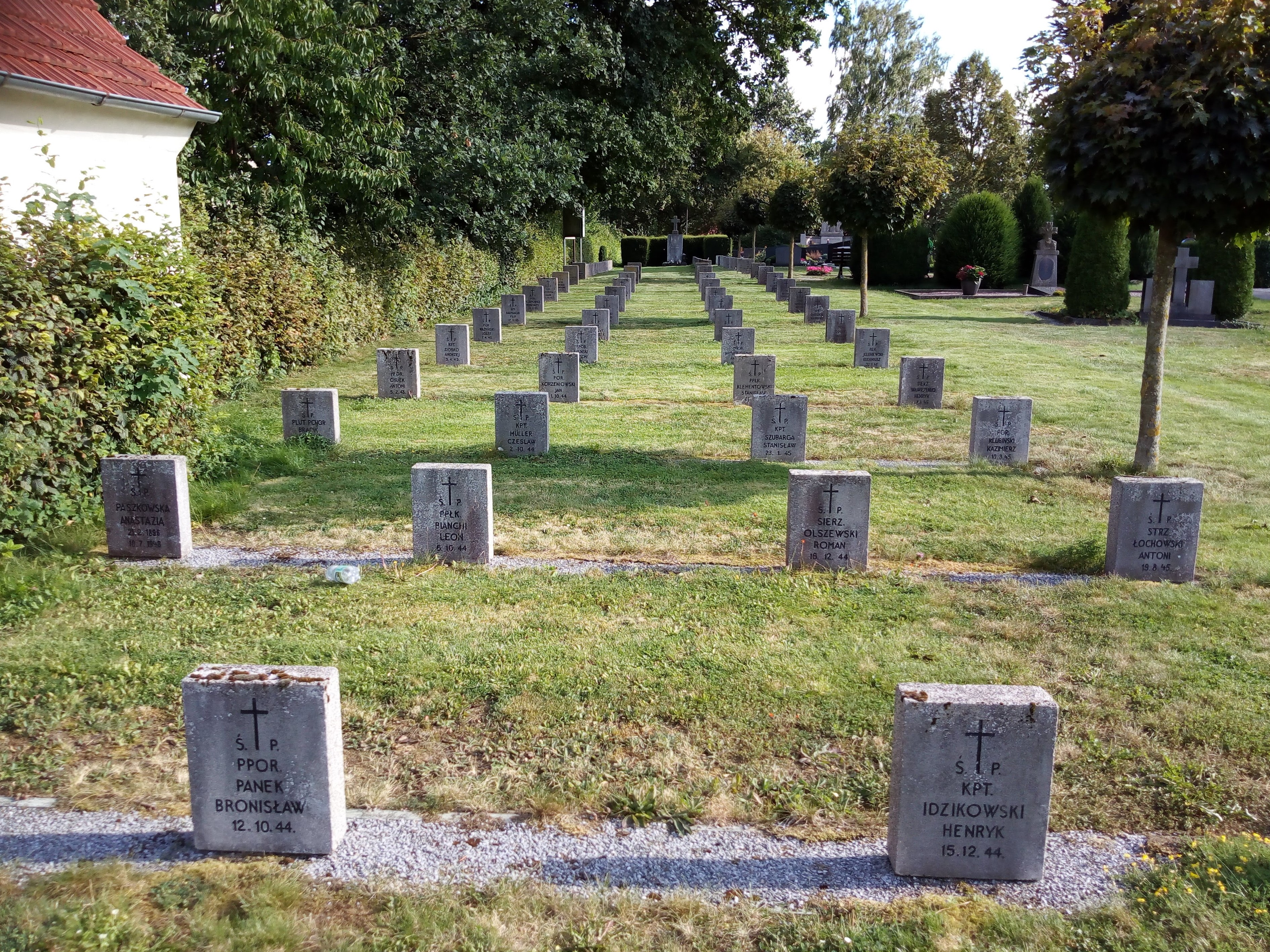 Offizierslager VI B in Dössel, Gräberfeld zentral